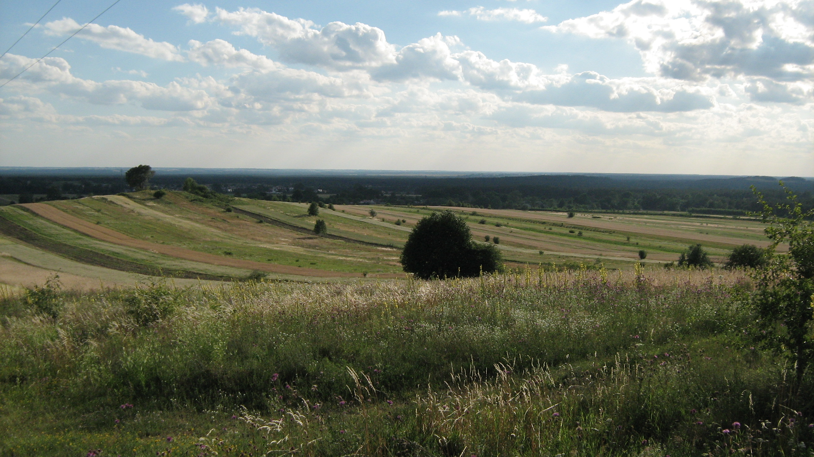 Wzniesienia Roztocza w okolicach Józefowa (pow. biłgorajski), w oddali widoczne są lasy Puszczy Solskiej i Równina Biłgorajska